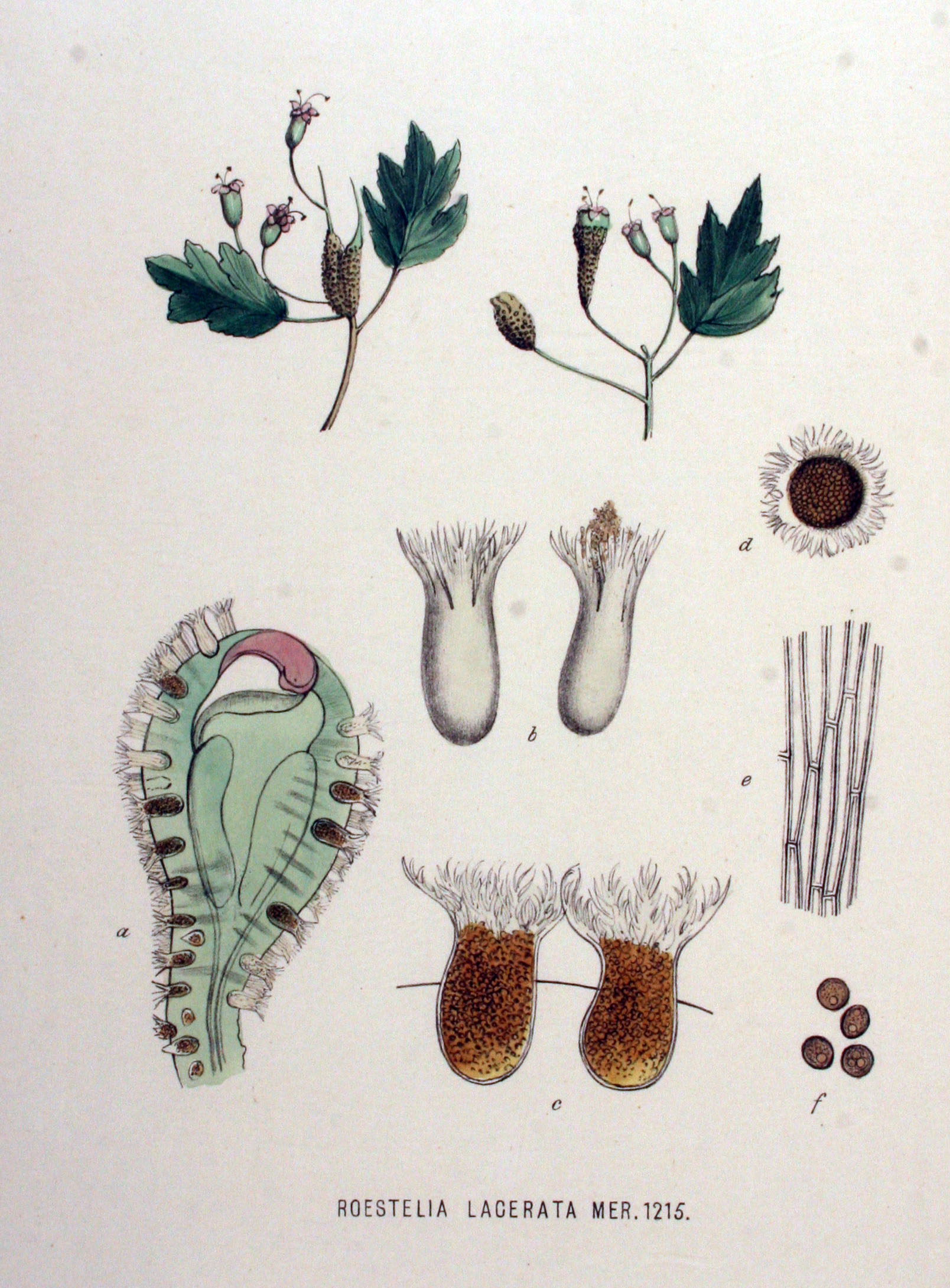 Roestelia lacerata (Jacquin) Mérat 1821